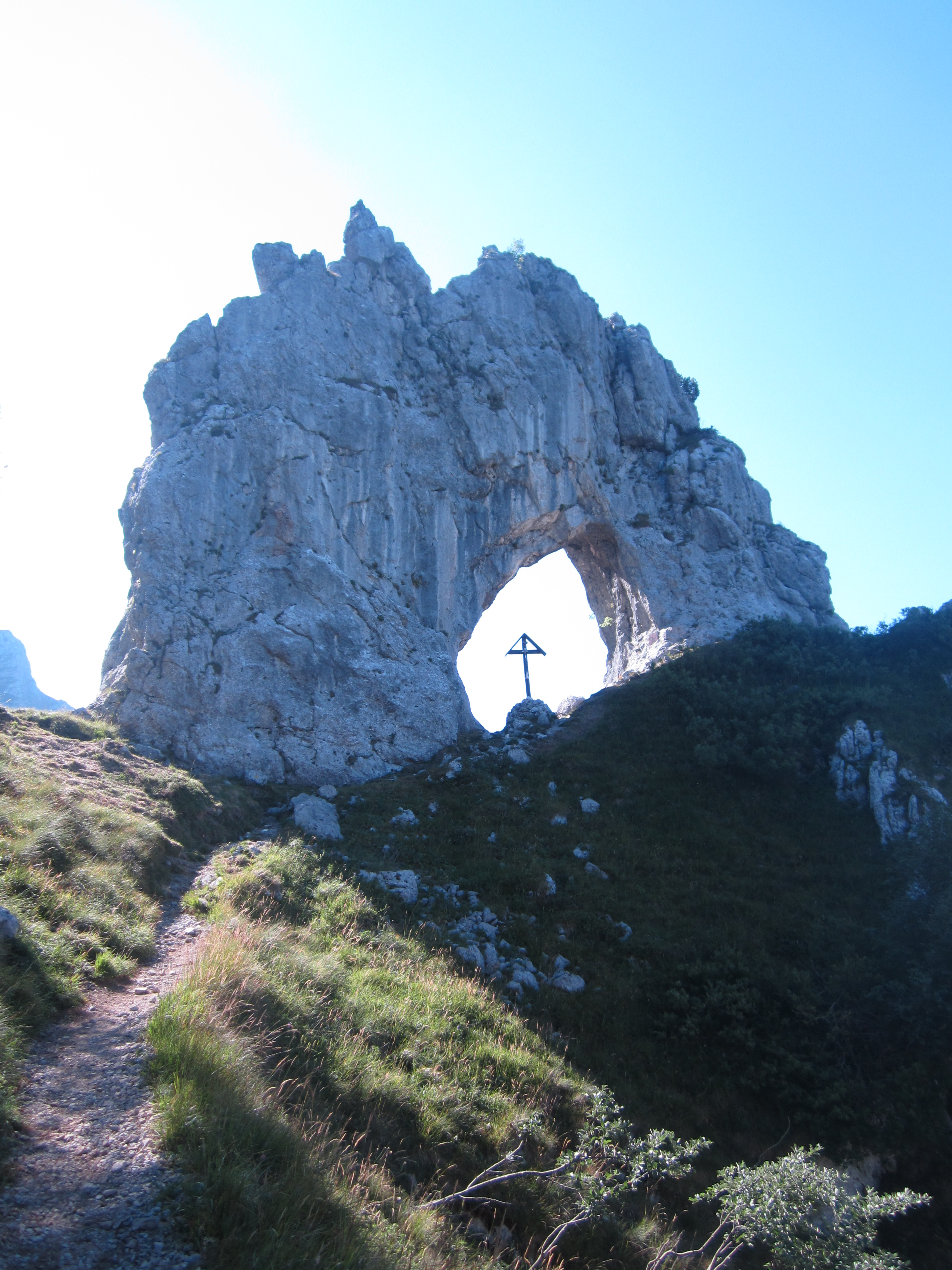 Chiesetta dei Partigiani a Prada This is a photo of a monument which is part of cultural heritage of Italy.